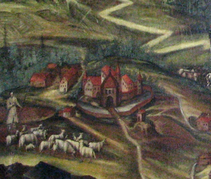 Schloss Jettenhofen im Landkreis Neumarkt in der Oberpfalz, Ausschnitt aus einem Ölgemälde des 18. Jahrhunderts unbekannter Hand in der Kirche zu Burggriesbach